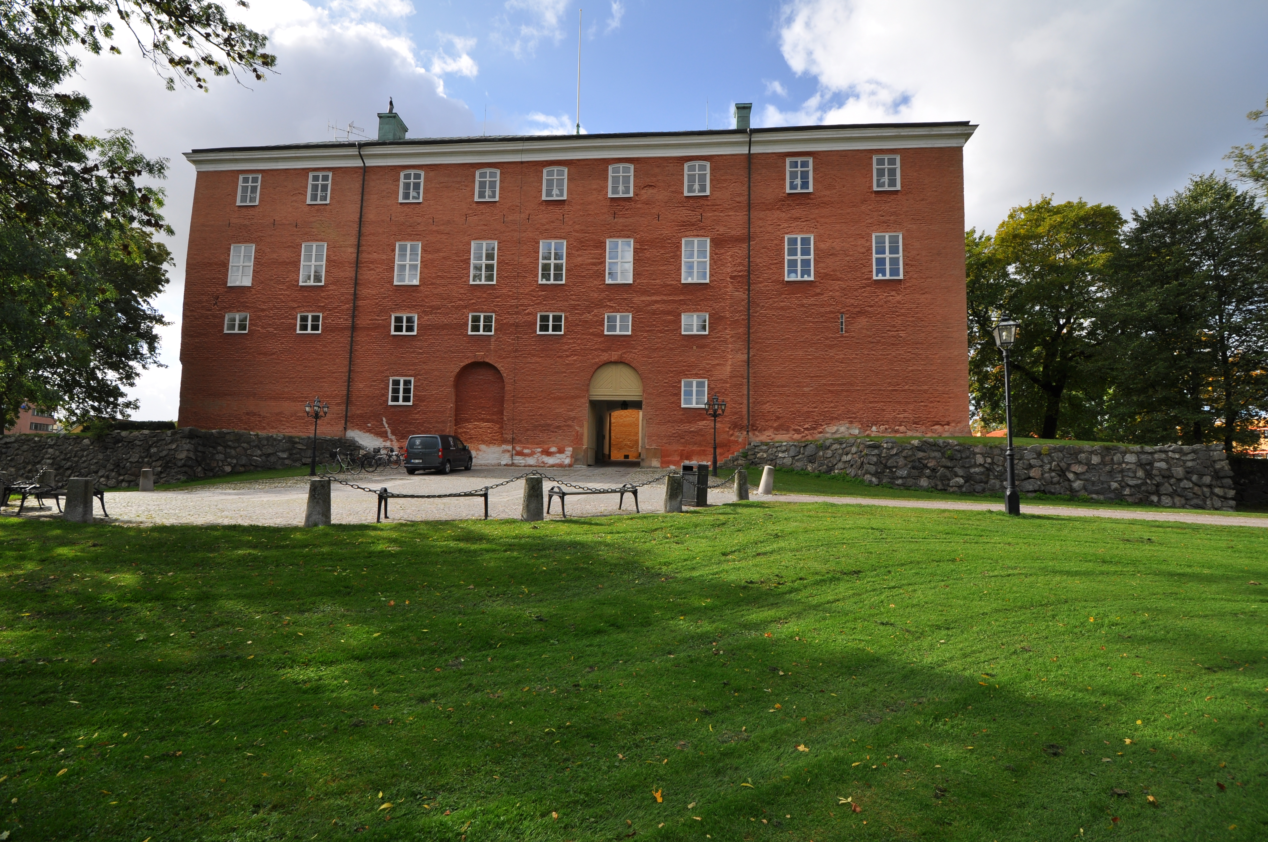 Västerås slott. Fasad mot öster.